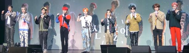 27일 오후 서울시 용산구 한남동 블루스퀘어에서 펜타곤 8번째 미니앨범 'Genie:us ' 발매 기념 쇼케이스가 열려 펜타곤이 시작전 인사말과 근황에 대해 이야기를 하고 있다. 펜타곤(진호, 후이, 홍석, 신원, 여원, 옌안, 유토, 키노, 우석)의 여덟 번째 미니앨범 'Genie:us'는 전곡 자작곡으로 구성되어 있어 펜타곤만의 음악적 색깔과 개성이 더욱 풍성하게 담긴 앨범으로, 타이틀곡 '신토불이'는 펜타곤의 '빛나리', 워너원의 '에너제틱'을 비롯한 수많은 명곡들을 탄생시킨 멤버 후이의 자작곡으로, 강한 비트와 시원한 멜로디가 포인트이며 후렴구에 반복되는 '신토불이'라는 단어가 중독성을 불러일으키는 퓨처 하우스 장르의 댄스곡이다.